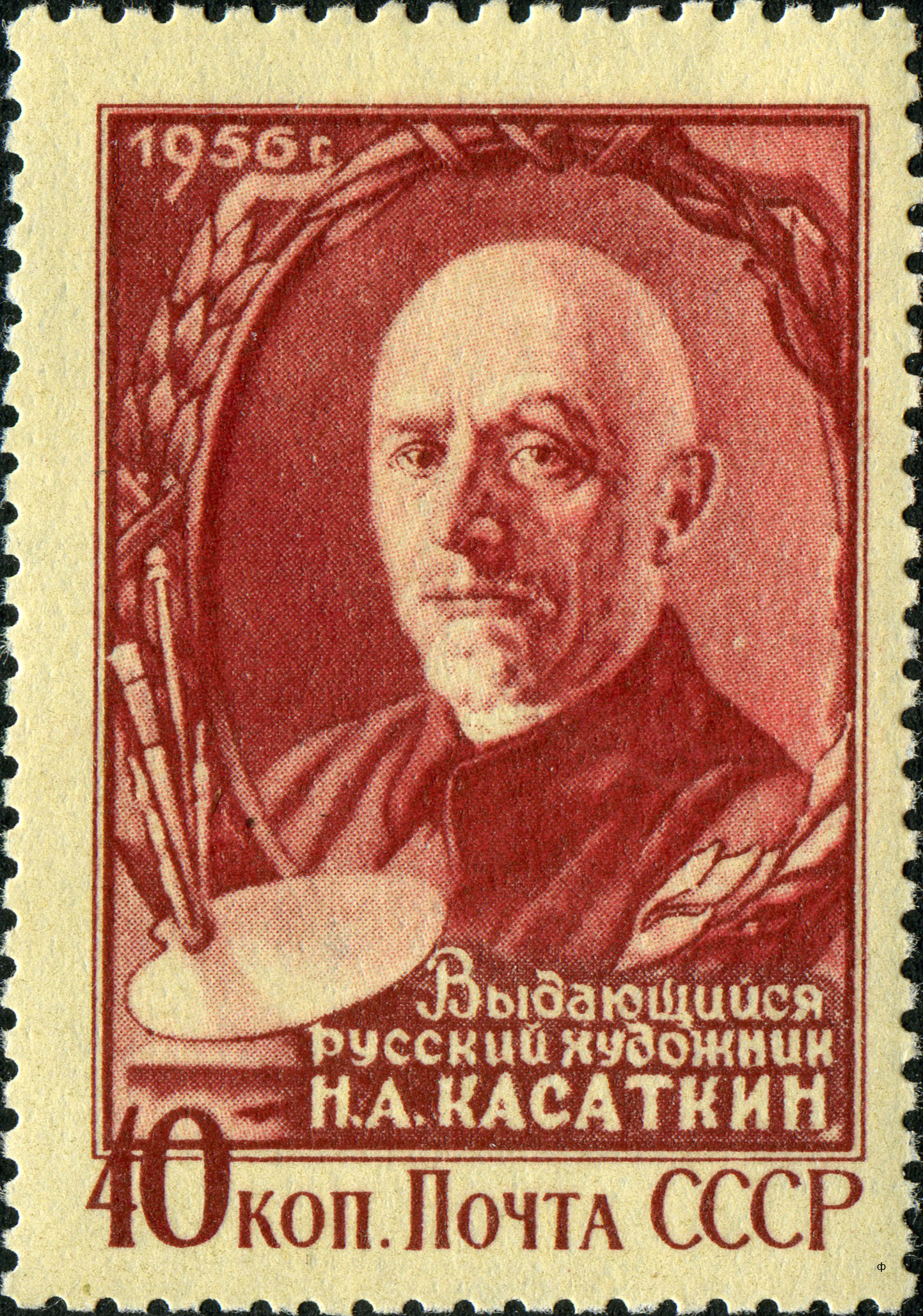 Марка СССР Russian stamp showing the painter Nikolai Kasatkin